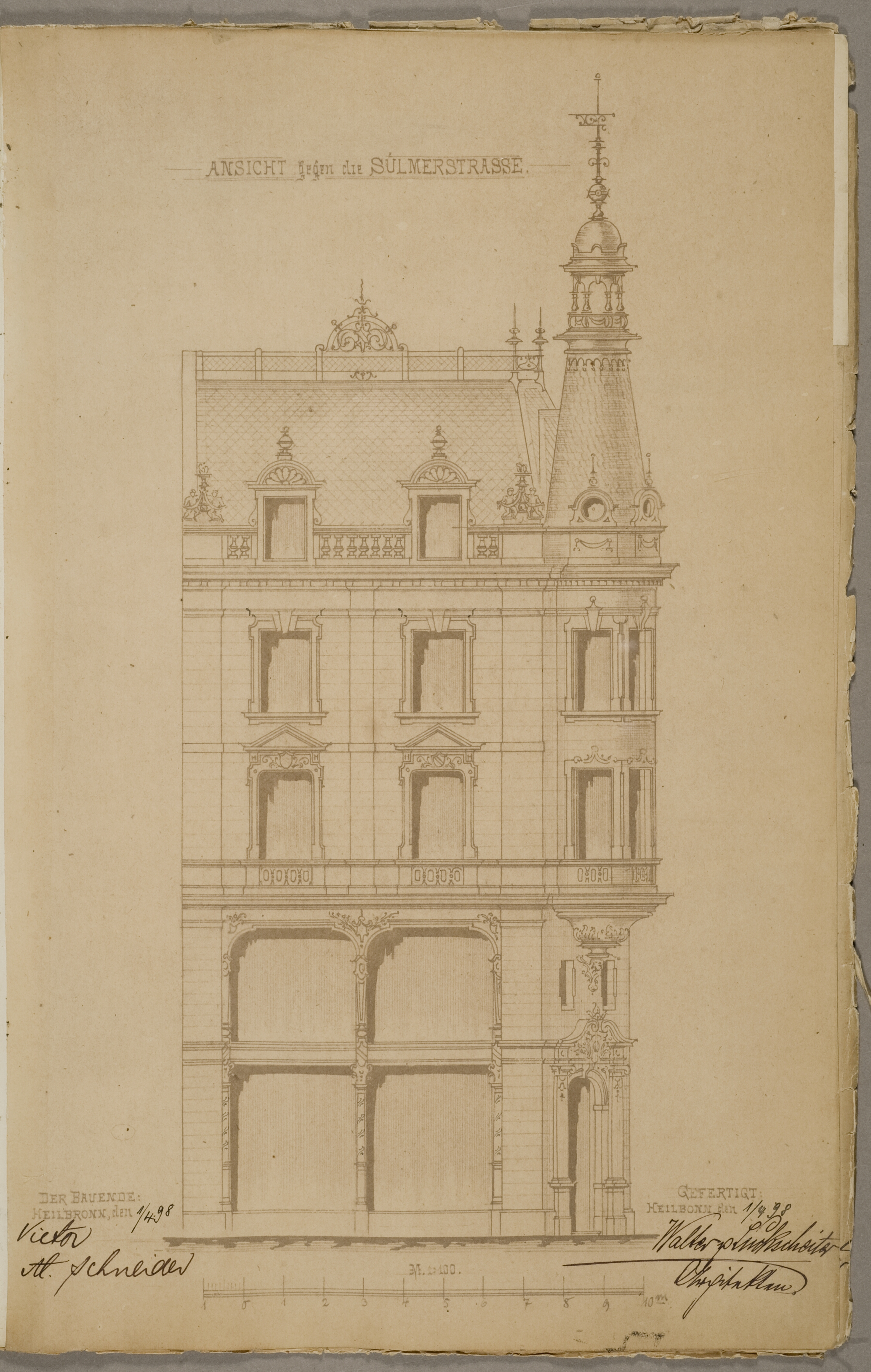 Haus Kaiserstraße 25 (1898) in Heilbronn auch bekannt als "Barbarinoeck". Bauherr war Kaufmann Victor Alfred Schneider. Erbaut nach Entwürfen der Architekten Ernst Walter und Carl Luckscheiter. 1918 erworben von der Bank für Handel und Industrie Darmstadt (Bankgeschäft Gumbel-Kiefe). 1932 erworben von dem Apotheker Manfred Koch. 1934 Barbarino-Geschäft..